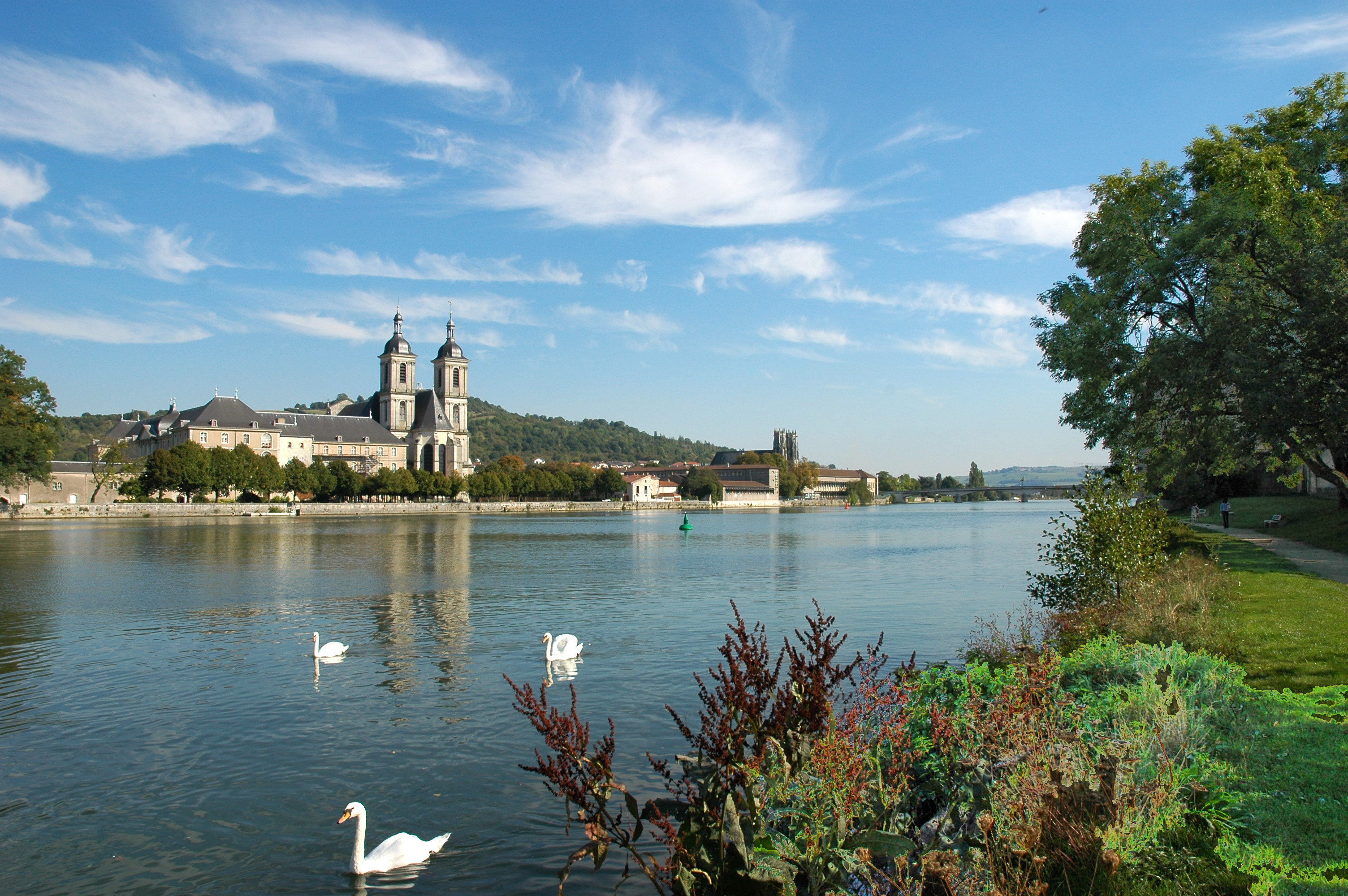 D'Musel bei Pont-à-Mousson Source:Eege Foto vum Commons-Rolf Krahl—Rotkraut; fotovershopt vum Cornischong